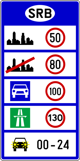 speed limits